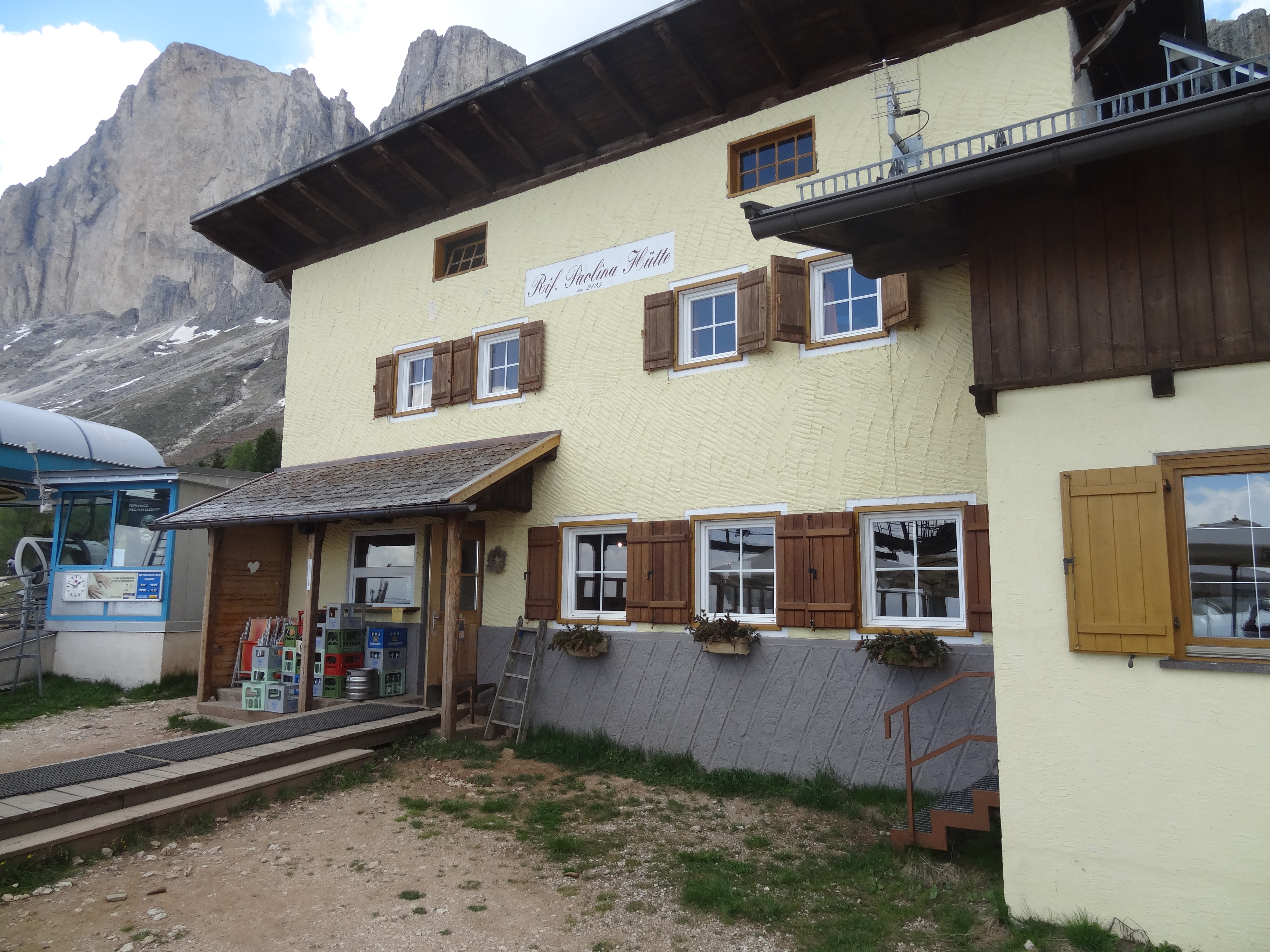 Vorderansicht der Paolina-Hütte